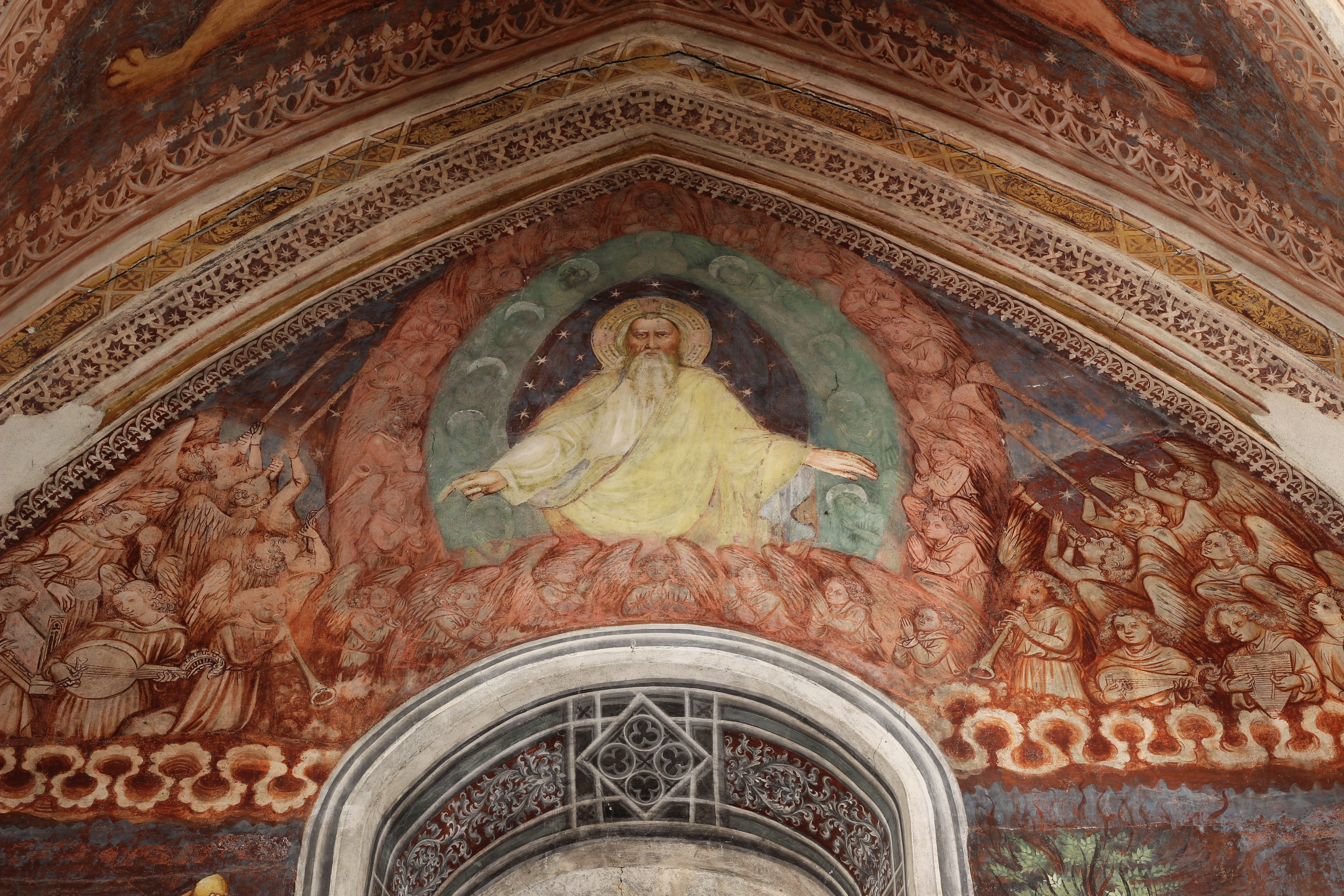 Friedhofskapelle bei der Pfarrkirche zur Schmerzhaften Muttergottes in Riffian (Südtirol): Gottvater zeigendes Fresko